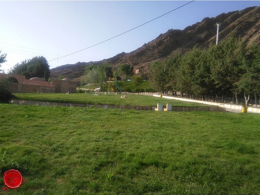 آستان خواجه خضر